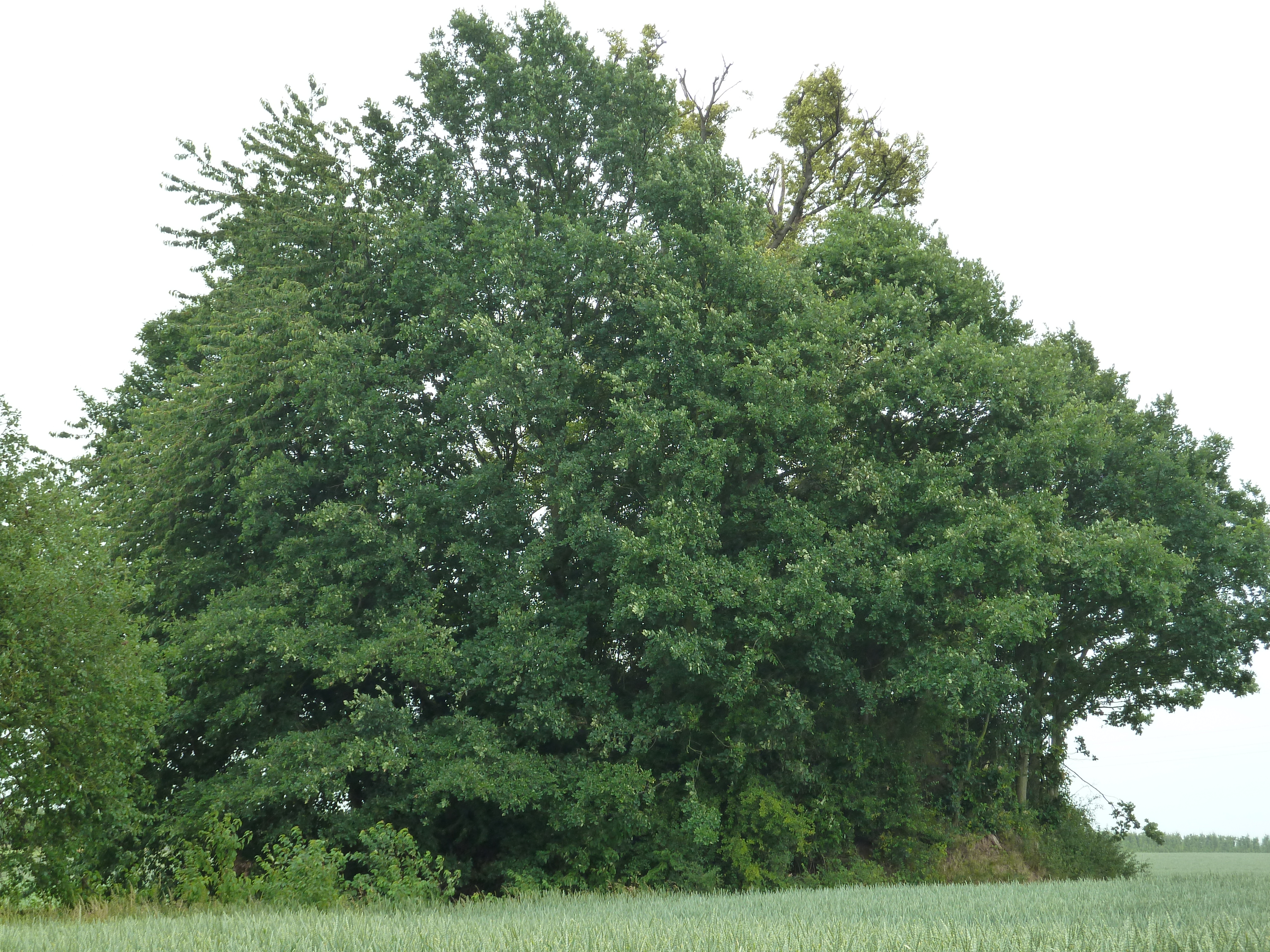 Les Cinq Tombes d'Omal, Geer, Belgique